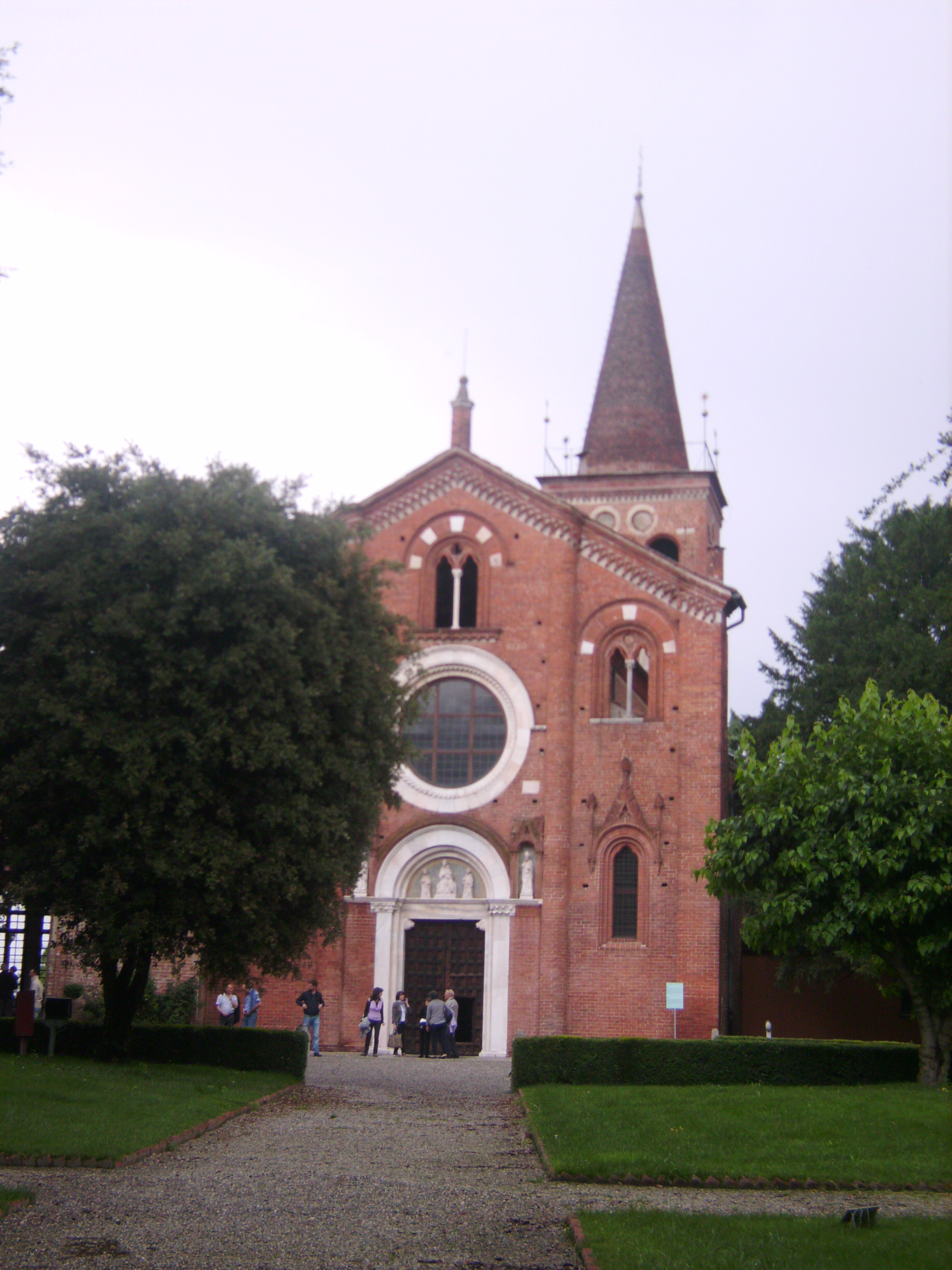 Abbazia di Viboldone (S. Giovanni Milanese)